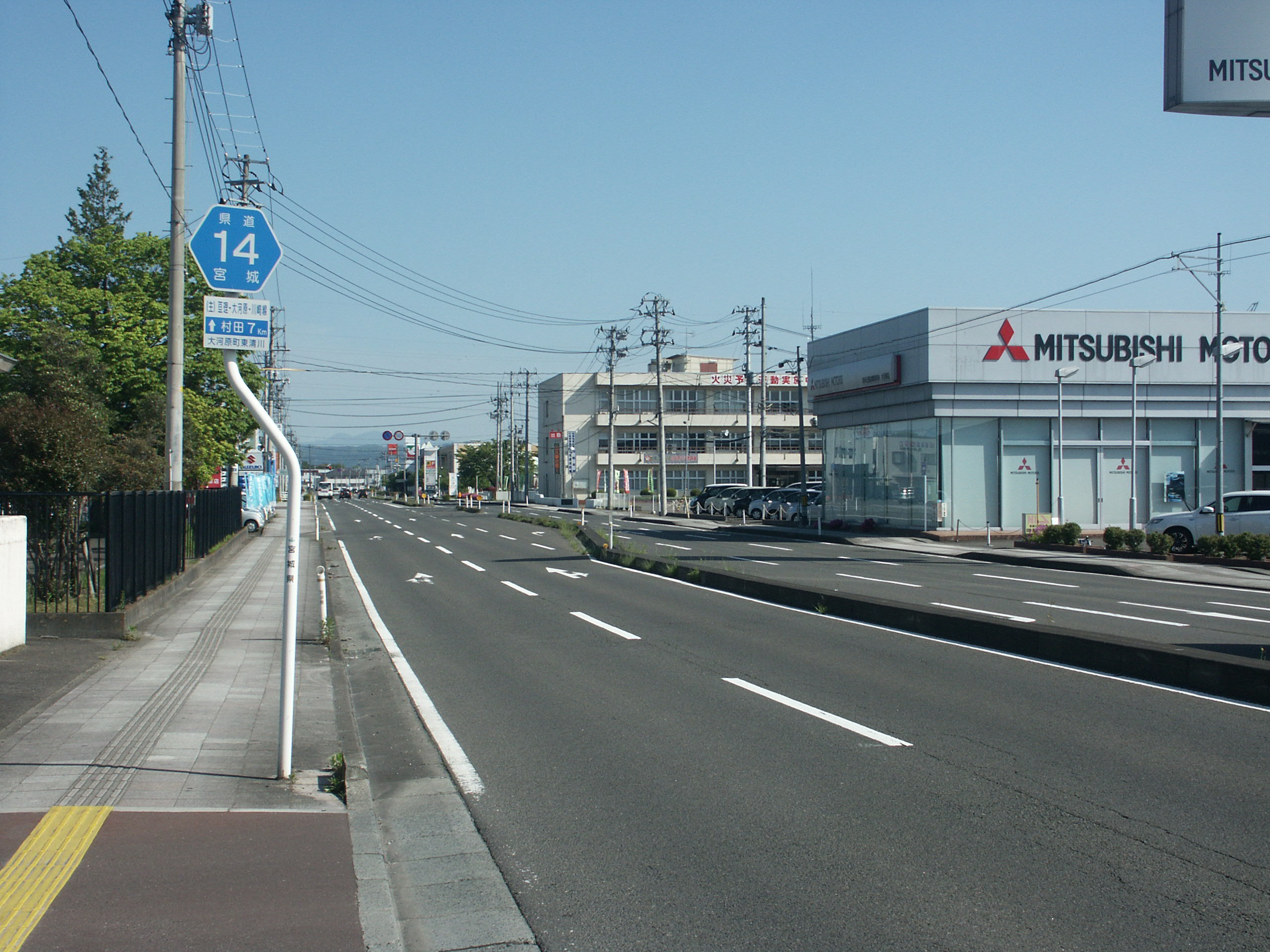 宮城県道14号線大河原町東清川付近